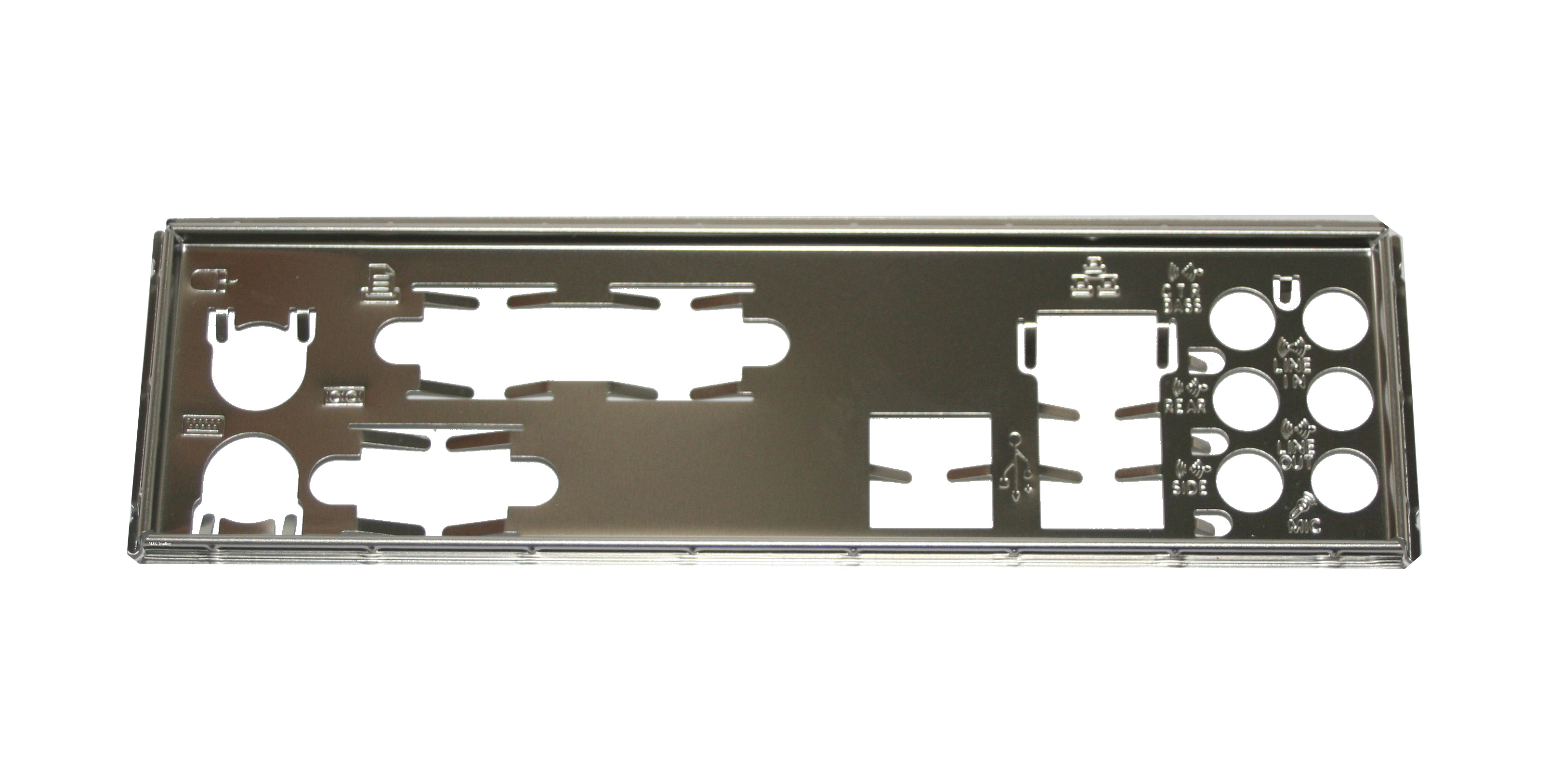 Gigabyte I/O Shield